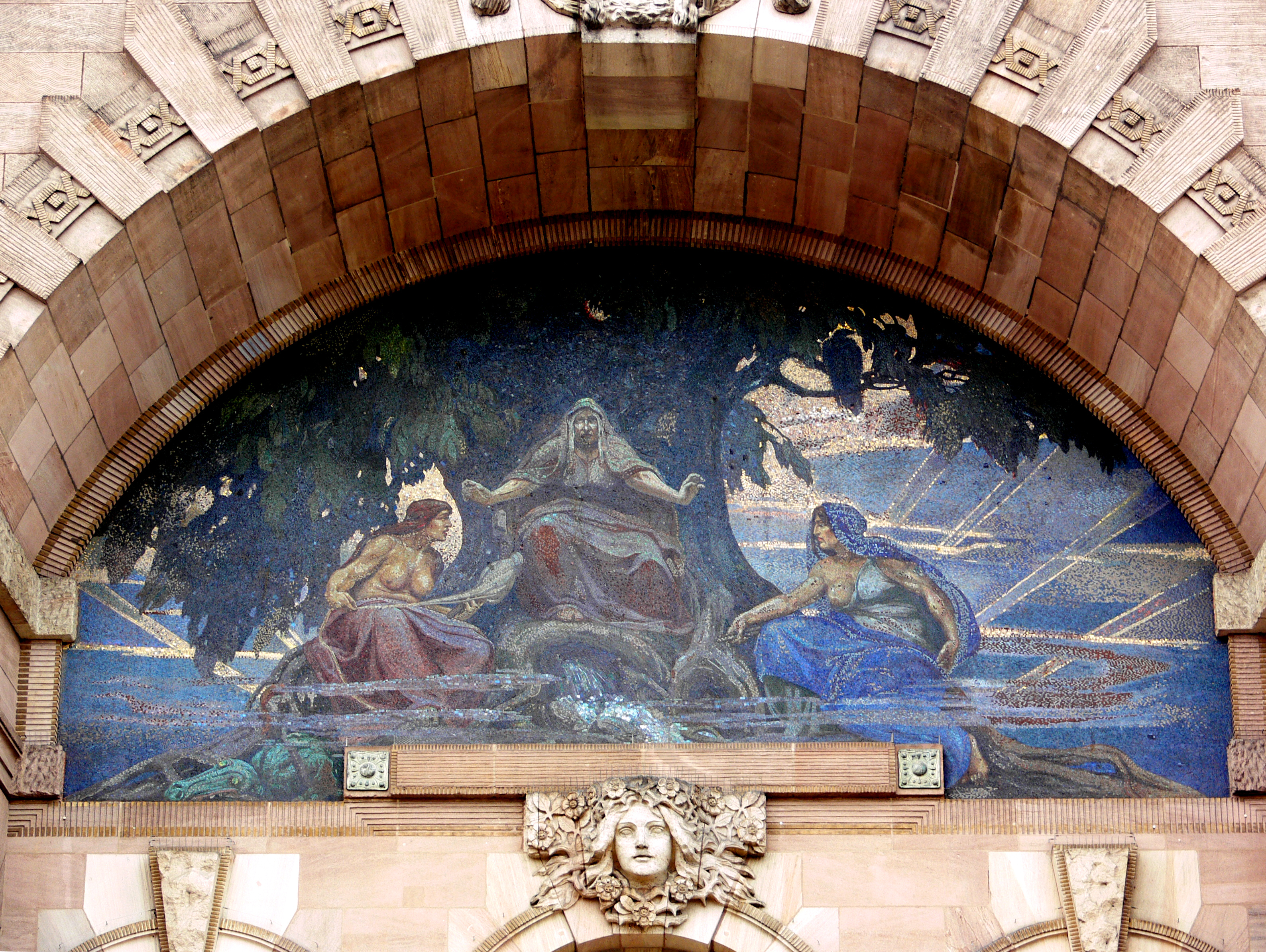 Staatstheater Nürnberg Opernhaus: Mosaik über dem Haupteingang, Hermann Schwabe jun.